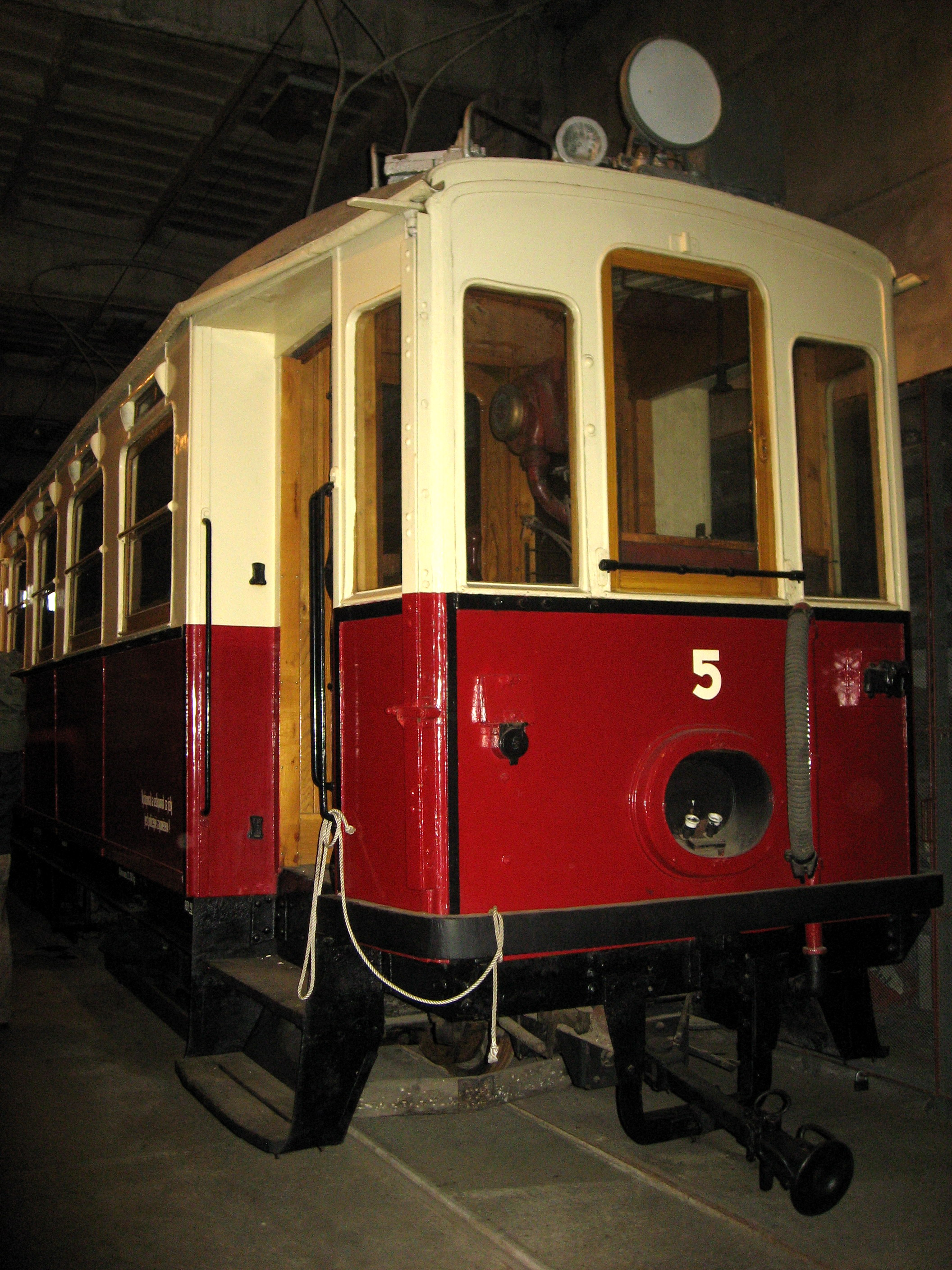 Osobní motorový vůz ev. č. 5 Slezských zemských drah, rok výroby 1912, výrobce Kopřivnice – exponát Technického muzea v Brně, depozitář MHD v Líšni